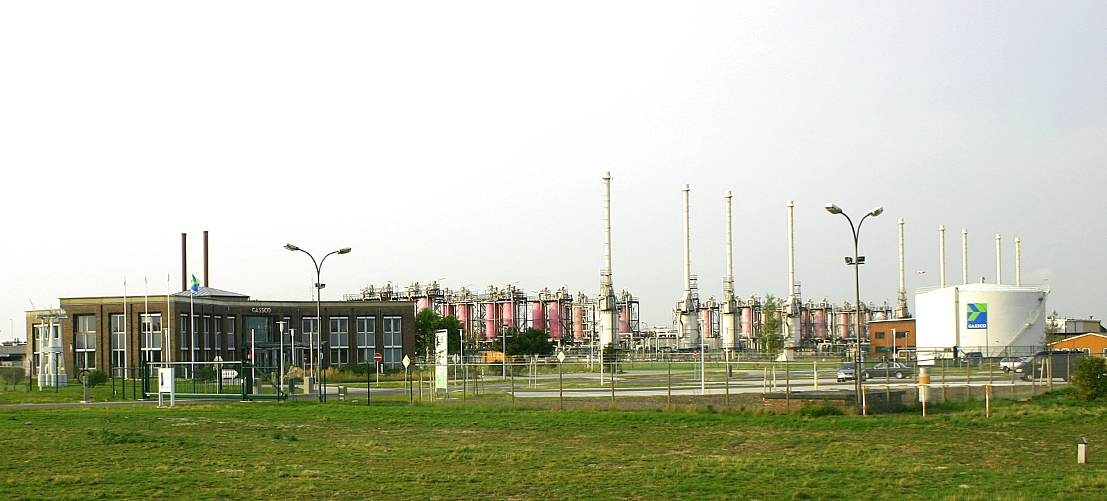 Norsea Gas Terminal (NGT) – Gasanlandestation an der Knock in Emden. Sie empfängt norwegisches Nordseegas und damit einen wesentlichen Teil des deutschen Erdgasimports.